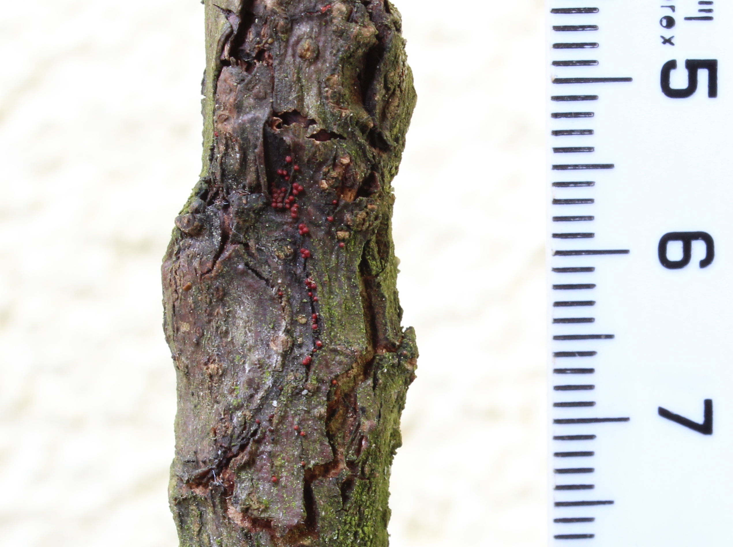 Fruchtkörper des Obstbaumkrebs (Neonectria ditissima)